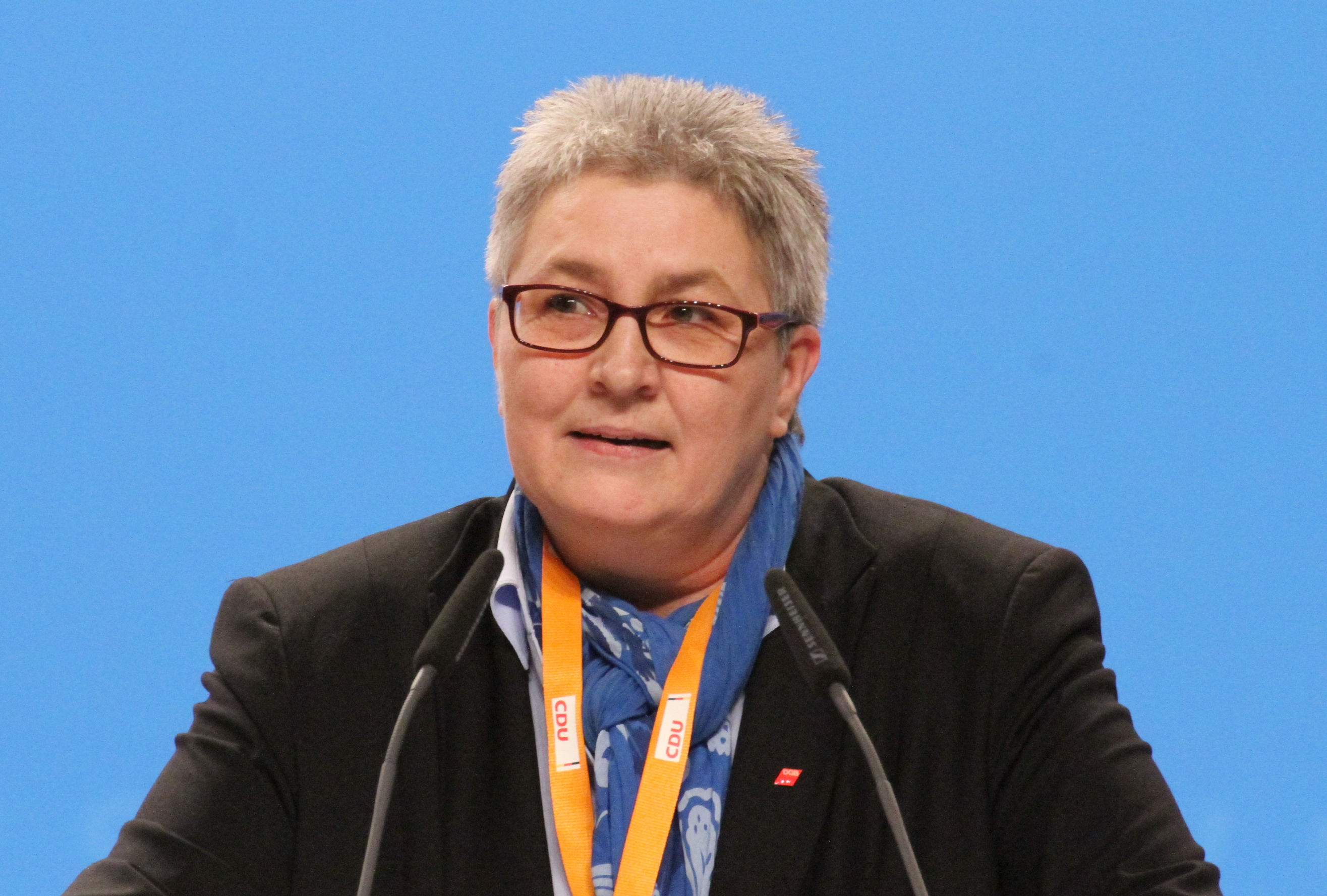 Elke Hannack auf dem CDU Bundesparteitag Dezember 2014 in Köln